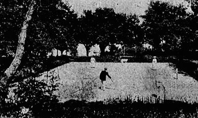 Tennis à Beg Meil vers 1910 (source : Revue "La Culture phisique" du 15 juillet 1910, auteur anonyme